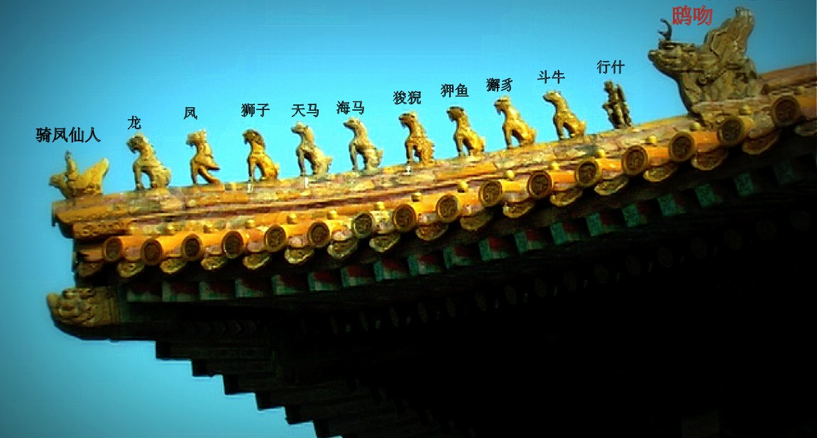 太和殿殿顶神兽排列示意图。